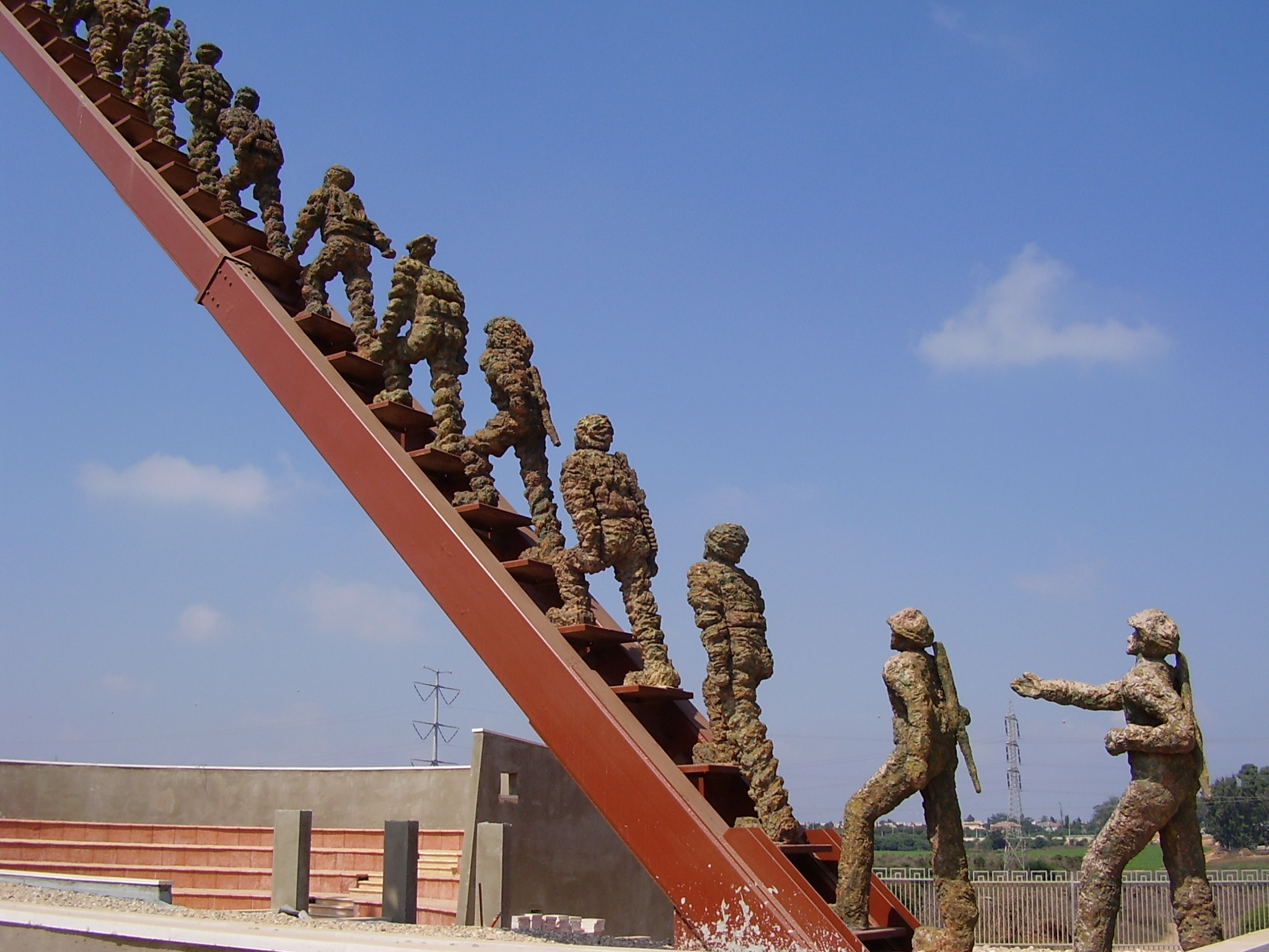 אנדרטת בית ליד